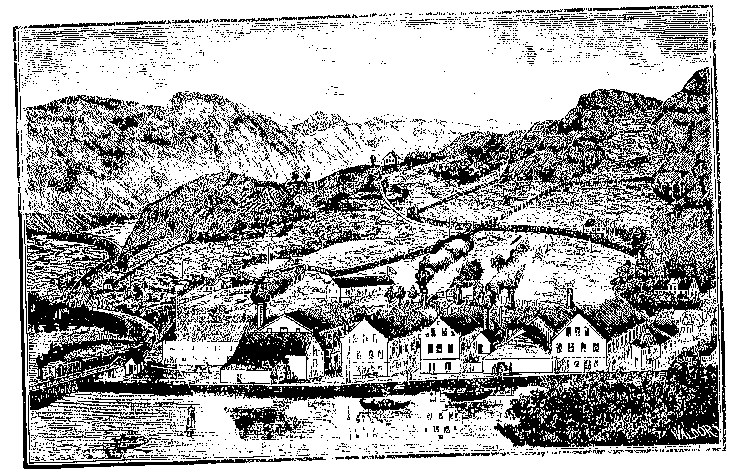 Egersunds Fajancefabrik.